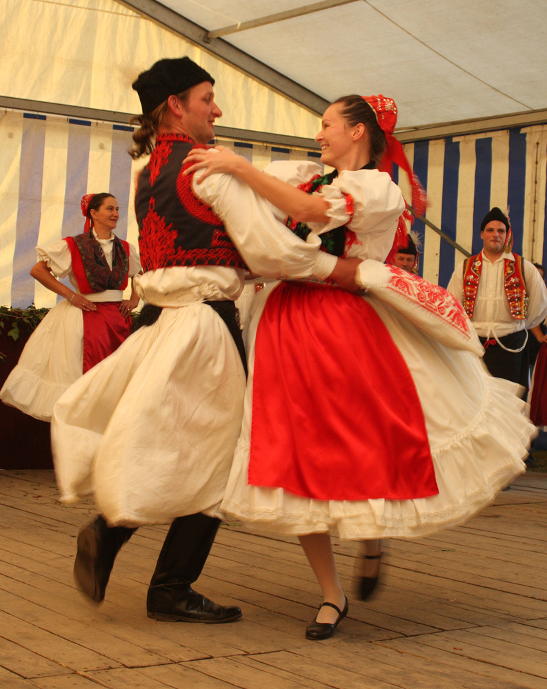 Szanyi népviselet, Fertőújlak (Mekszikópuszta)